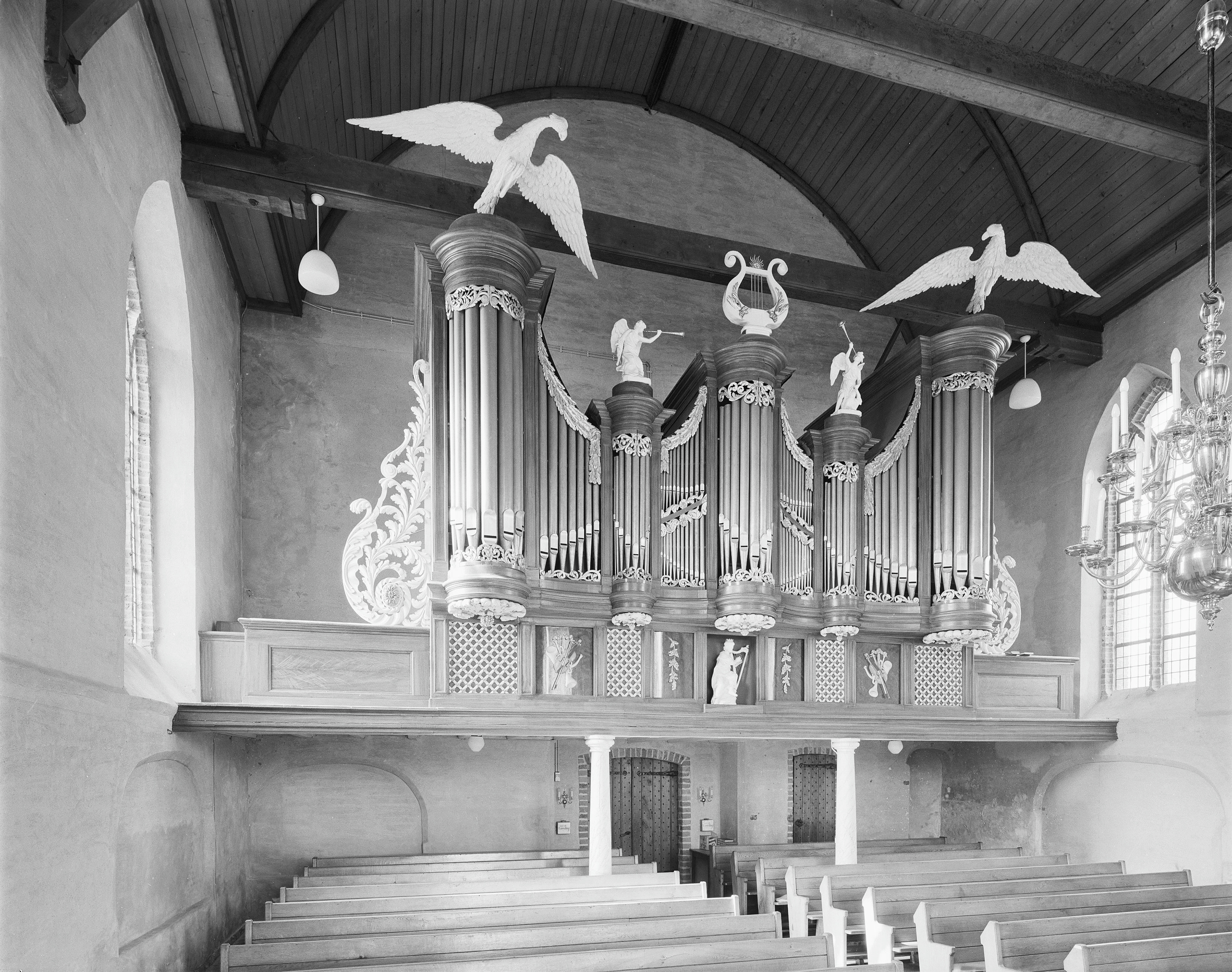 Nederlands Hervormde Kerk: INTERIEUR, ORGEL